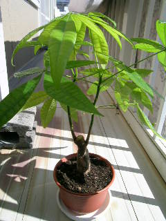 観葉植物パキラ